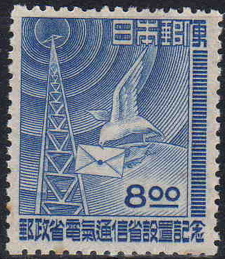 日本の郵政省と電気通信省設置記念切手